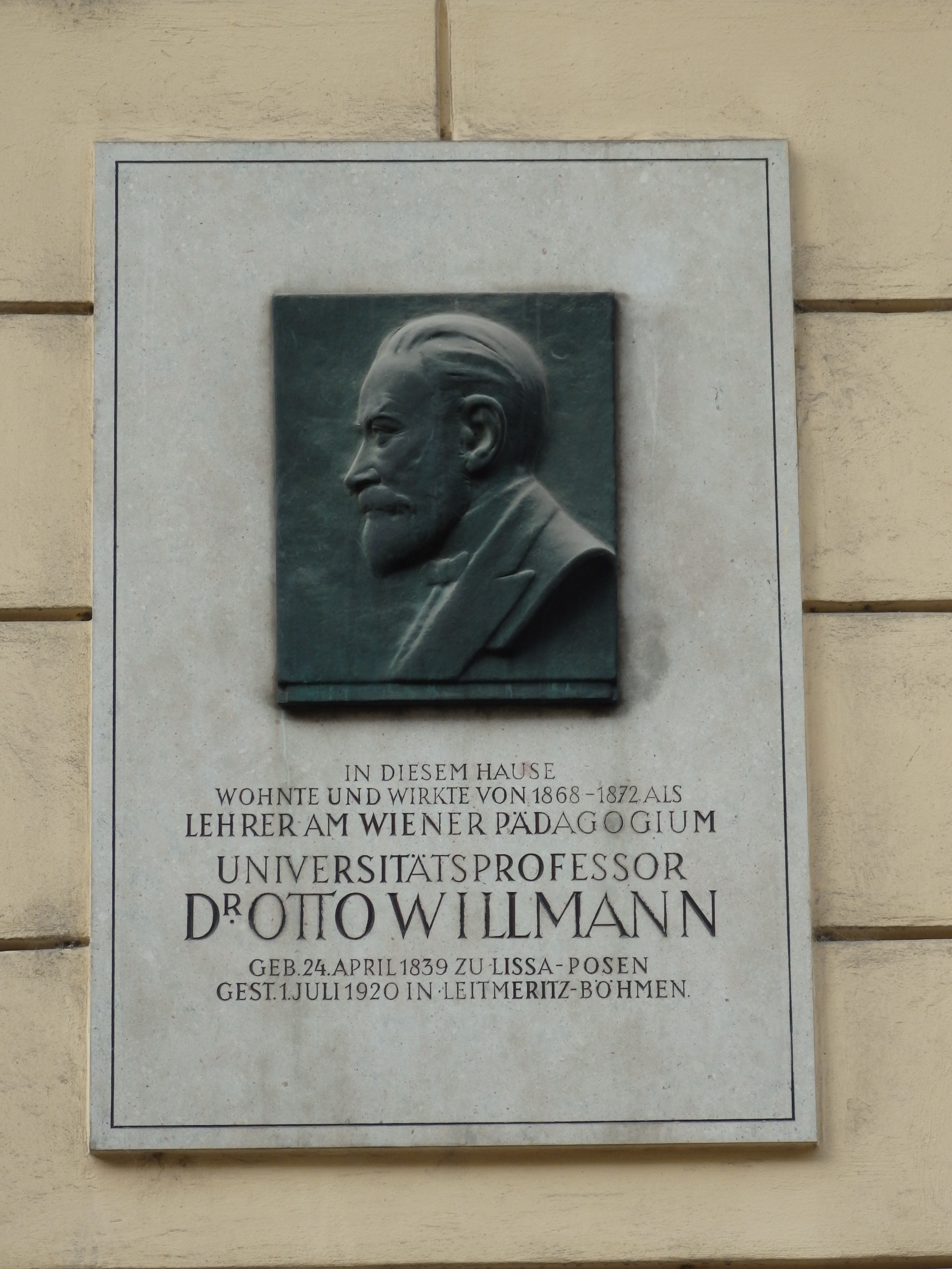 Gedenktafel Otto Willmann, Fichtegasse 3, Wien-Innere Stadt